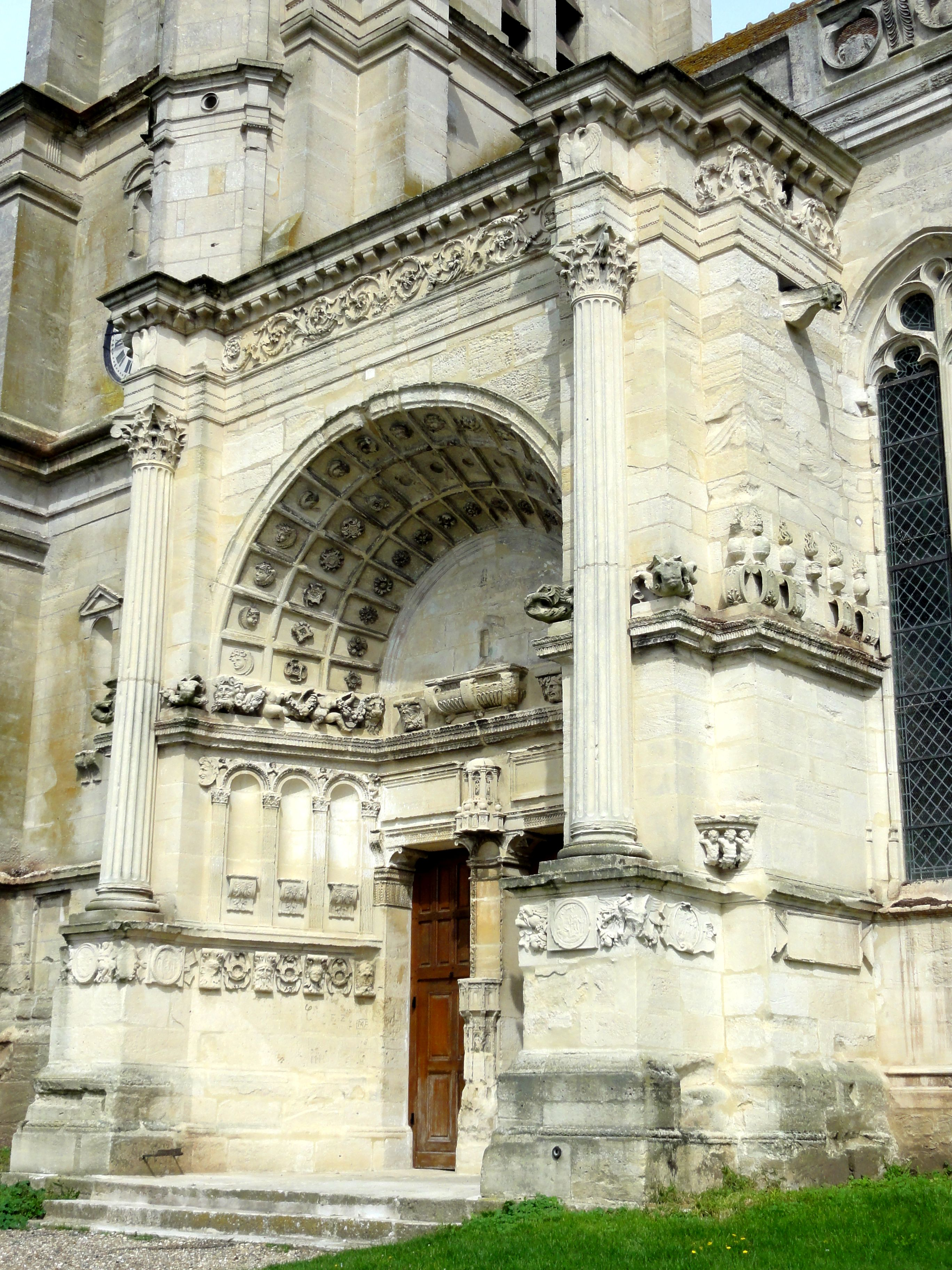 Portail.